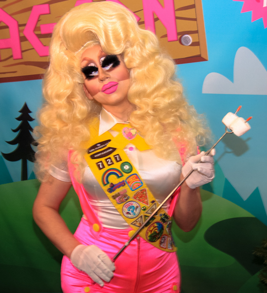 Trixie Mattel at RuPaul's DragCon LA 2018